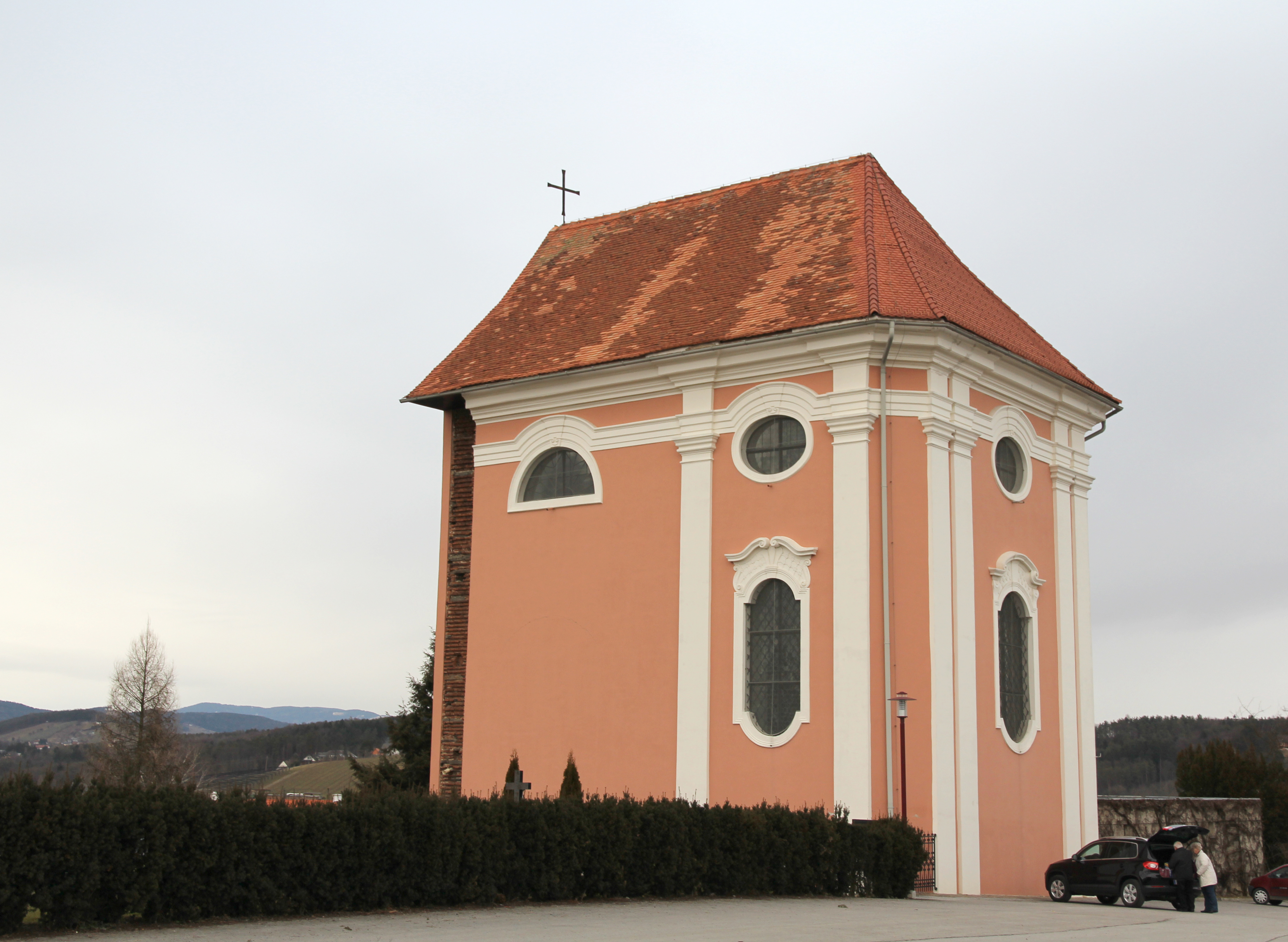 Kath. Filialkirche hl. Johannes Nepomuk und Friedhof